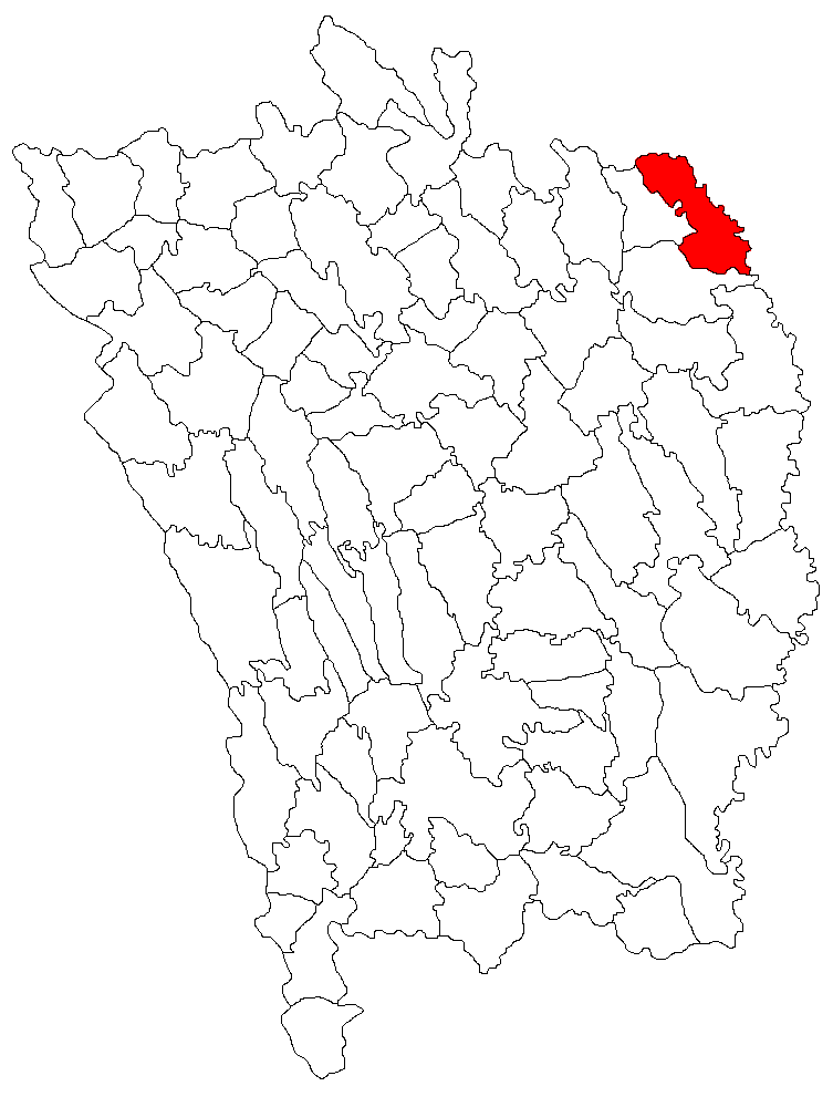 Categorie:Hărţi ale judeţului Vaslui